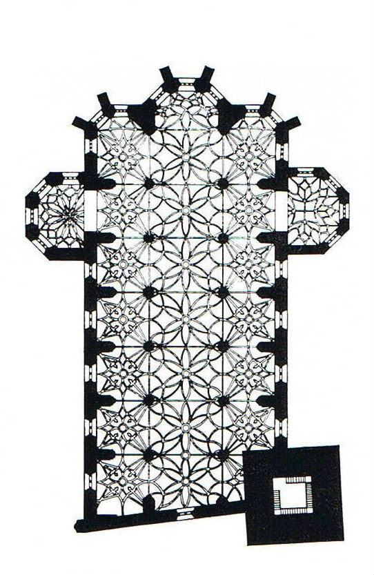 Grundriss der St.-Annen-Kirche